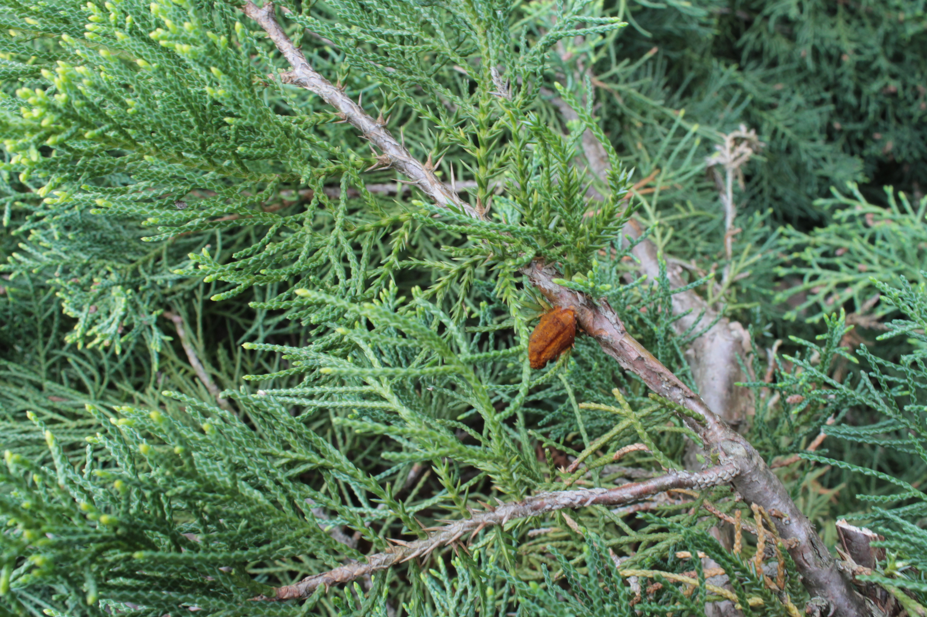 rez hrušňová